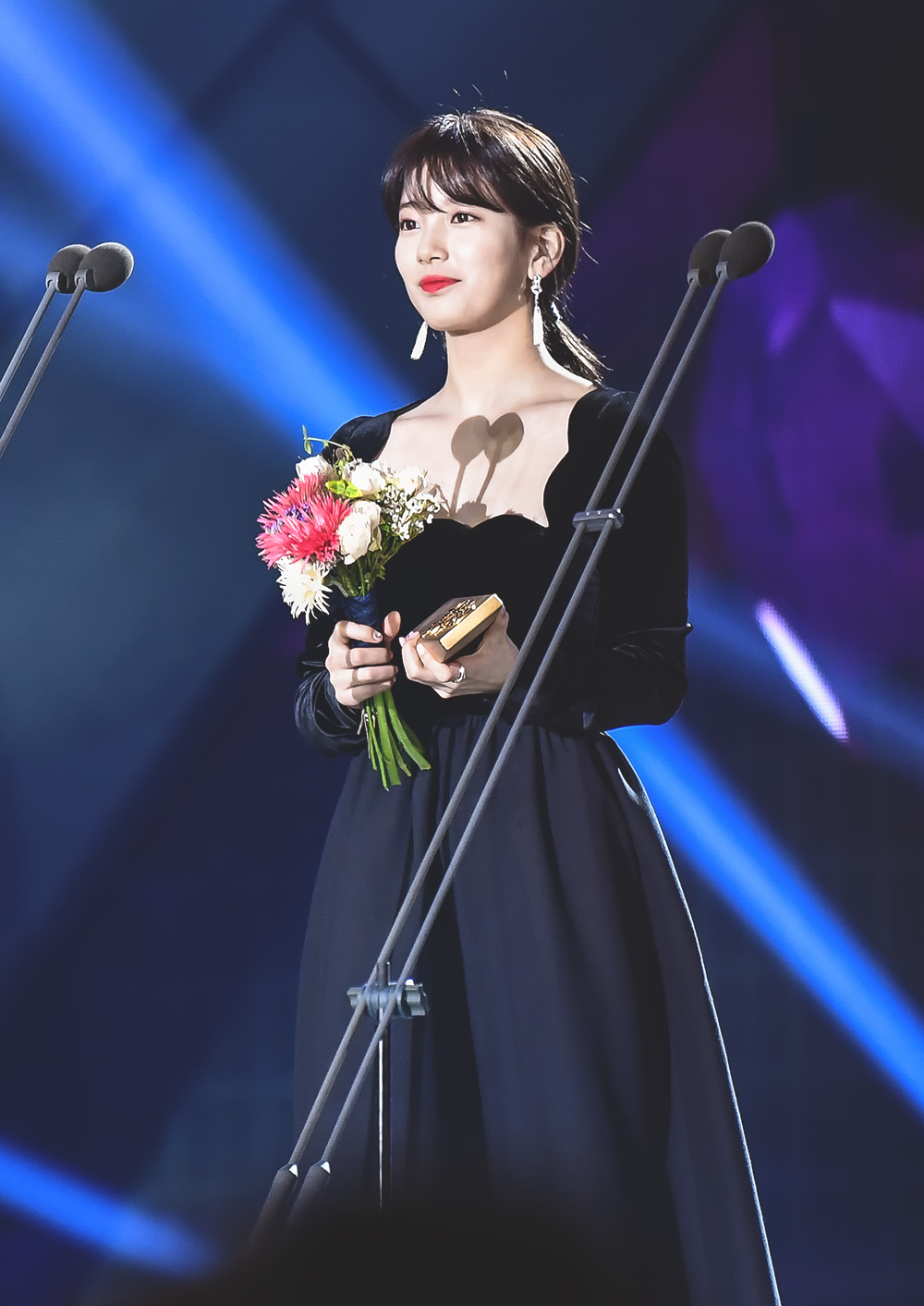 180503 54회 백상예술대상